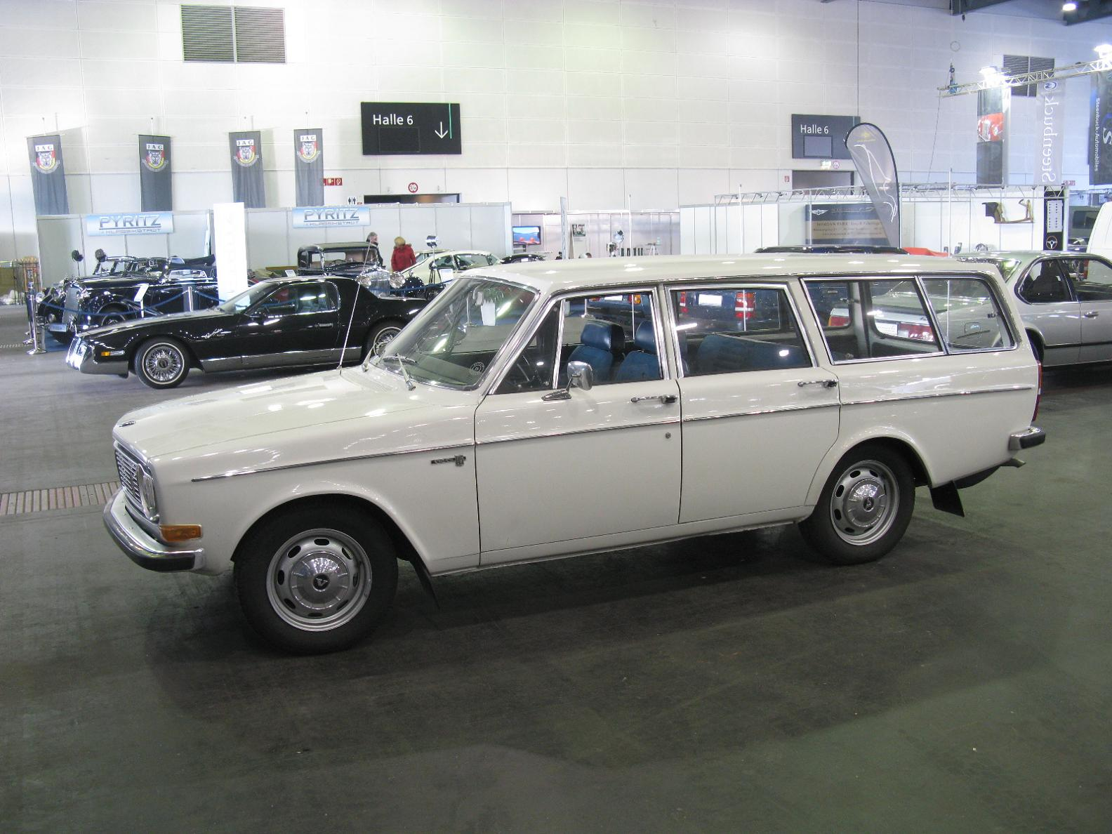 Volvo145